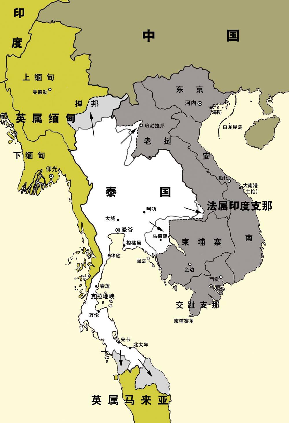 第二次世界大战中的泰国。